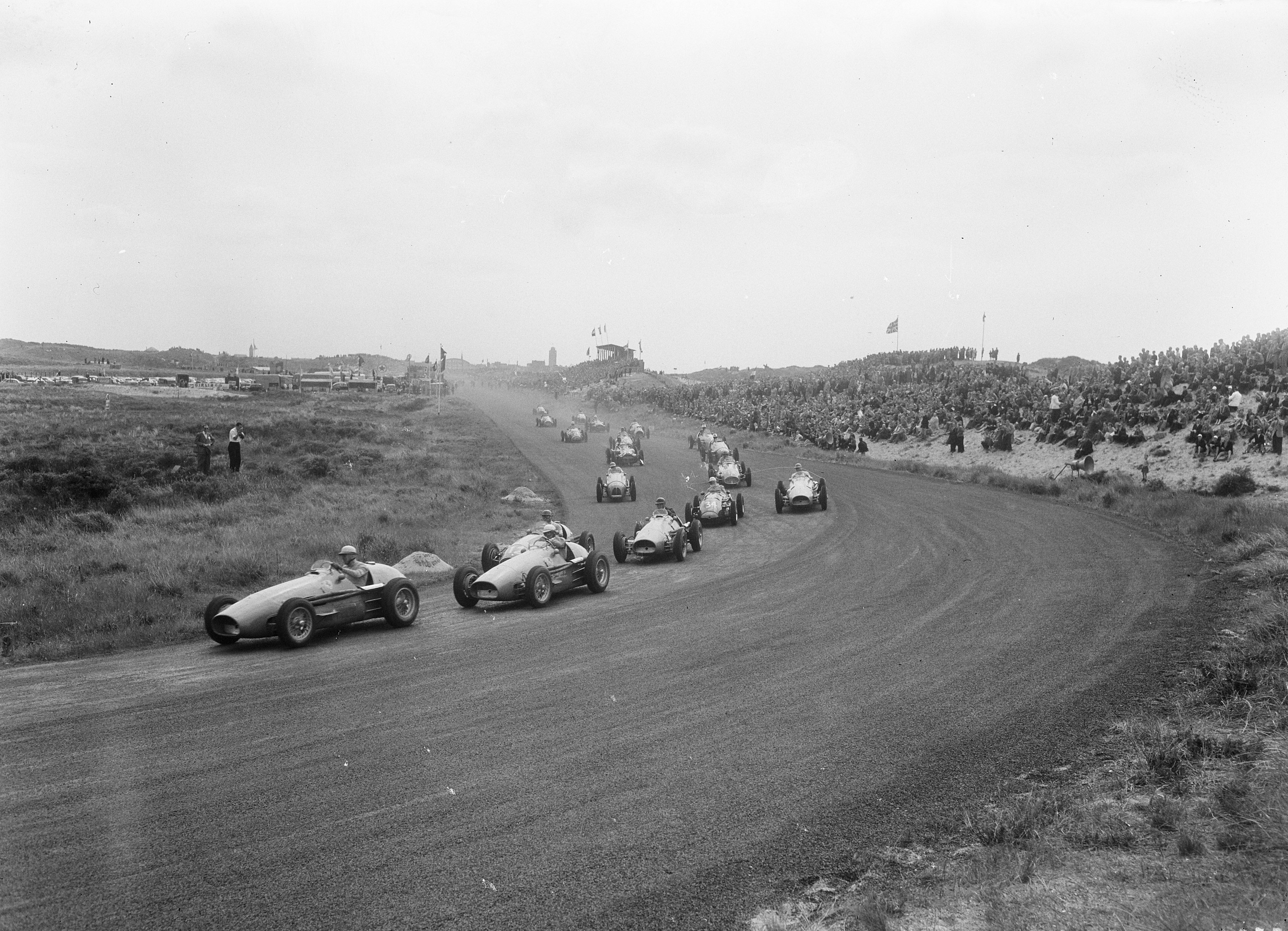 Collectie / Archief : Fotocollectie Anefo Reportage / Serie : Grand Prix Zandvoort 1953 Beschrijving : Autoraces Dutch Grand Prix Zandvoort. Auto's in de bocht Datum : 7 juni 1953 Locatie : Noord-Holland, Zandvoort Trefwoorden : auto's, sport Fotograaf : Pot, Harry / Anefo Auteursrechthebbende : Nationaal Archief Materiaalsoort : Glasnegatief Nummer archiefinventaris : bekijk toegang 2.24.01.09 Bestanddeelnummer : 905-7655